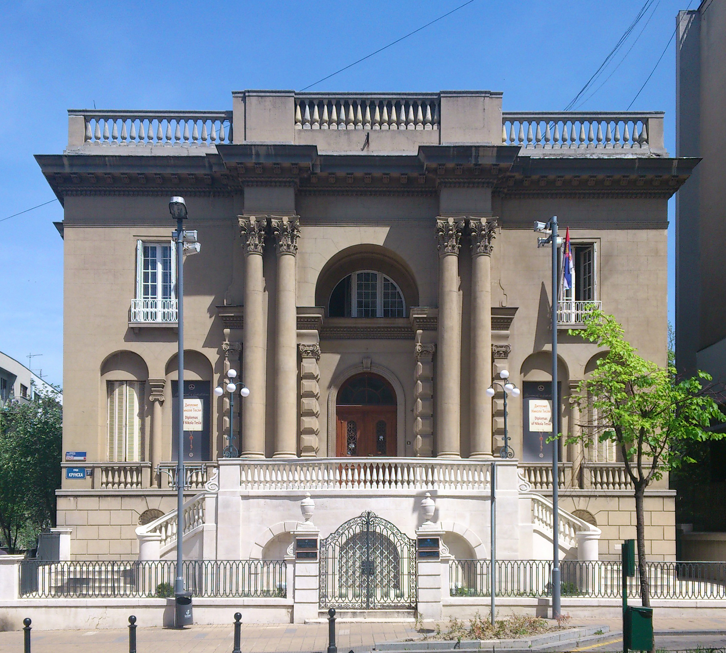 Beograd Genčićeva kuća Krunska 51 Muzej Nikole Tesle